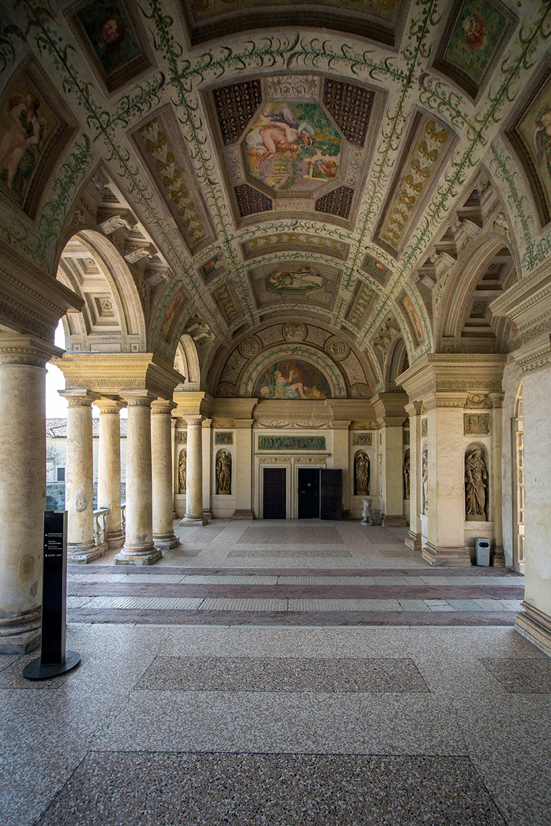 Blick zur Eingangstüre des Palazzo del Te, Mantua